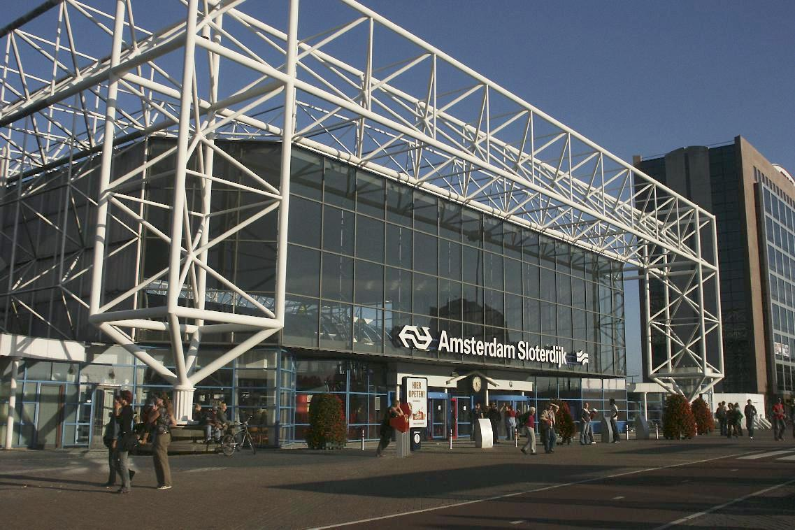 Foto van het station Amsterdam Sloterdijk. Zelfgemaakt te Amsterdam op 2006 09 09.